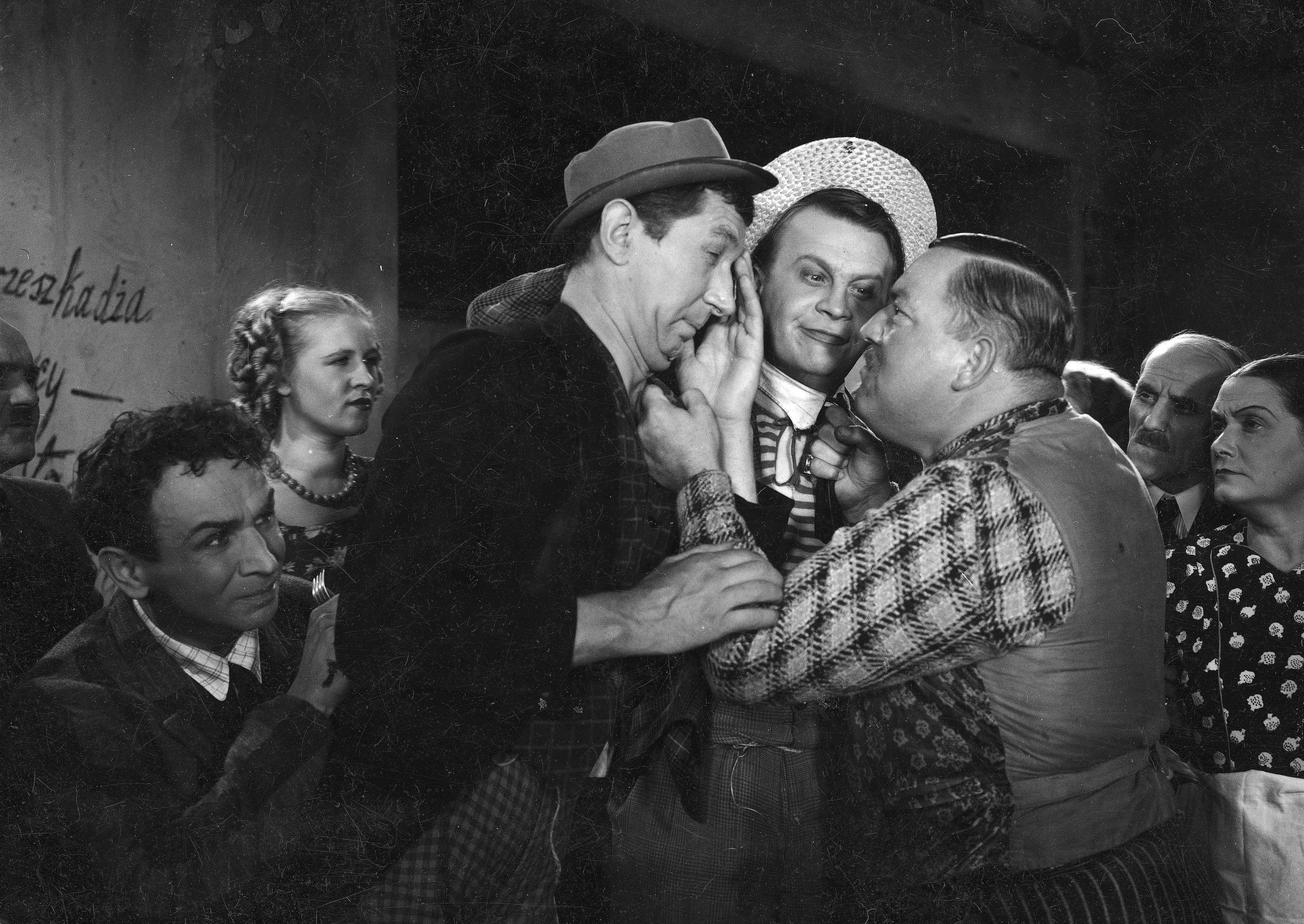 Jedna ze scen filmu. Na pierwszym planie od lewej: Józef Kondrat, Stanisław Woliński, Stanisław Sielański, Czesław Skonieczny.